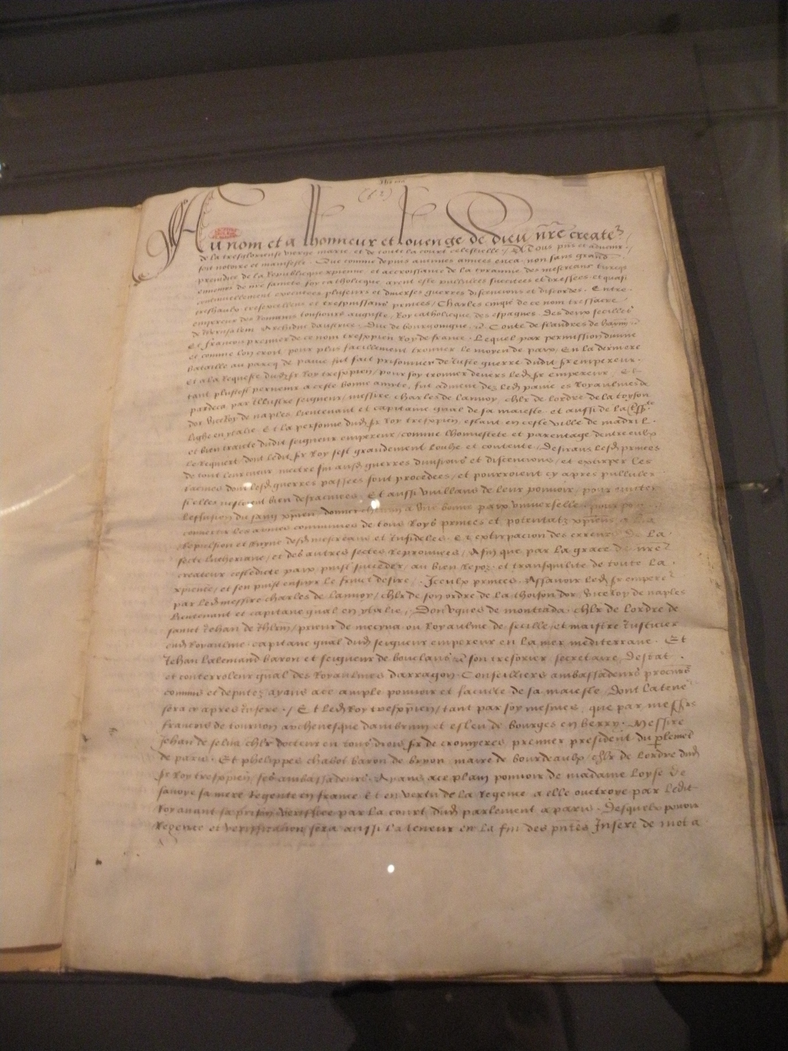 Traité de Madrid, première page (Musée des Archives nationales, Hôtel de Soubise)